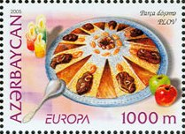 Plov